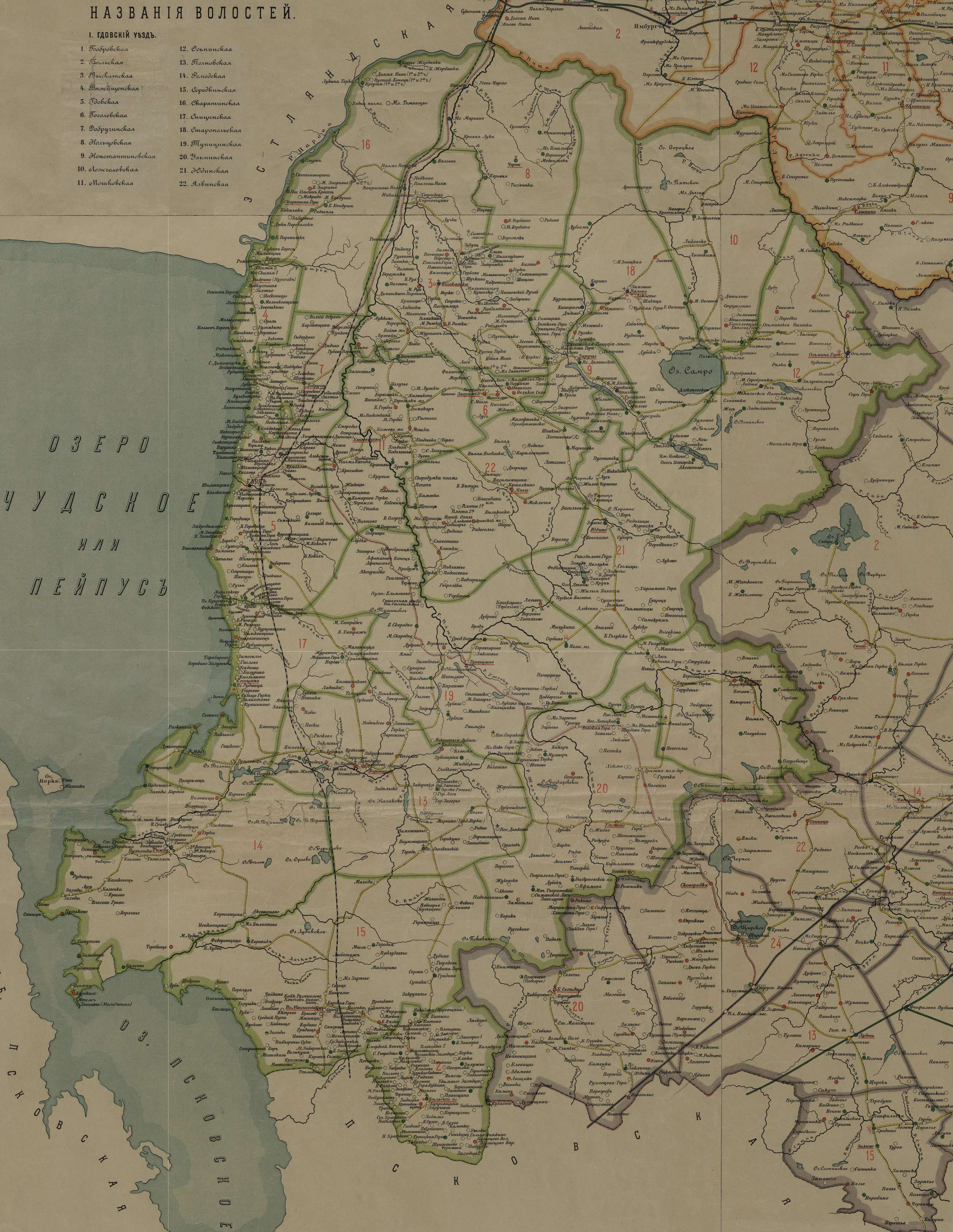 Гдовский уезд на карте Петроградской губернии 1916 года, с разделением на волости.